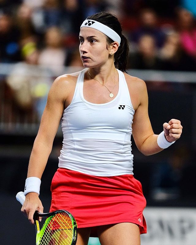 Anastasija Sevastova, Latvian tennis player